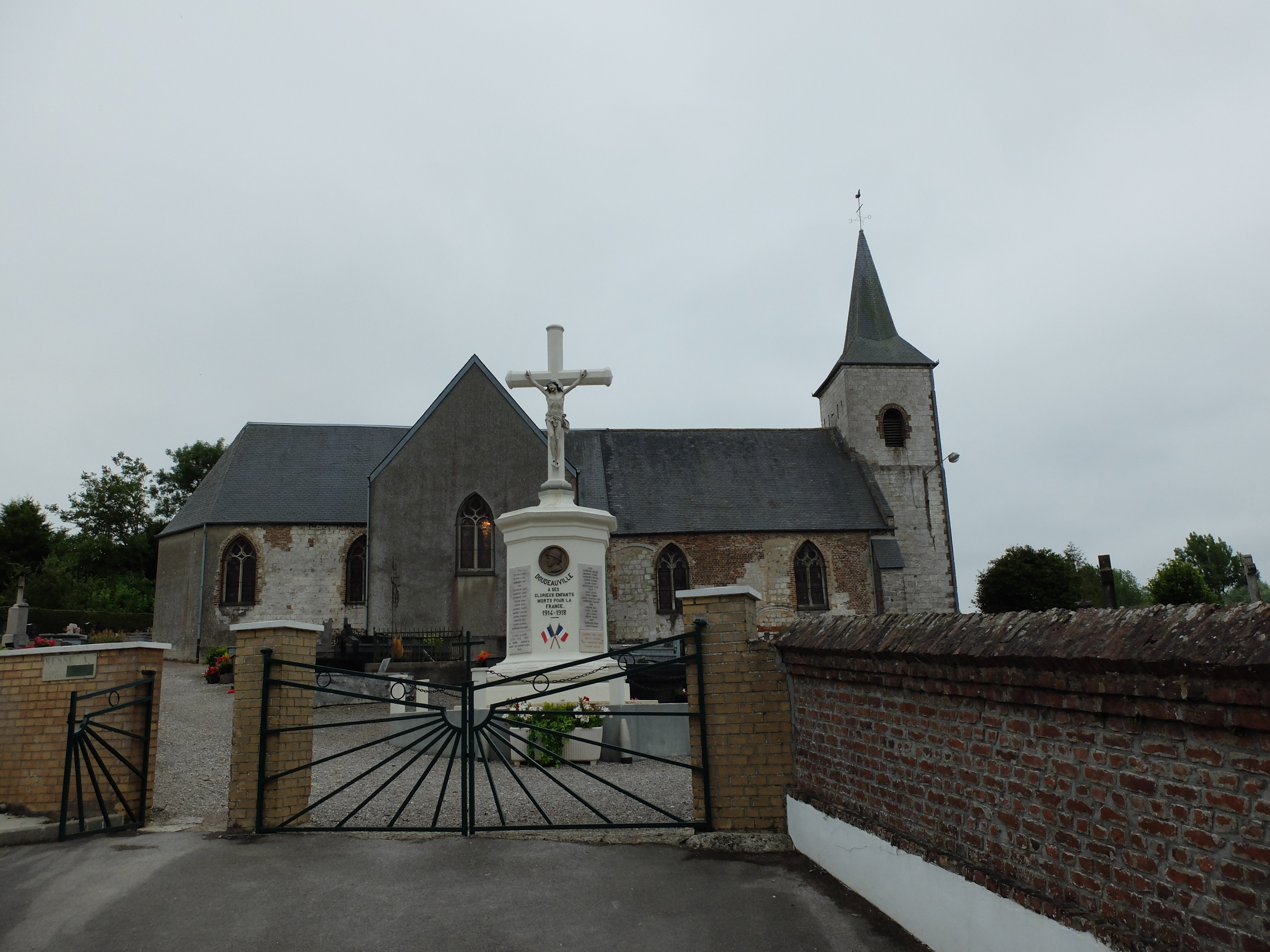 Vue de l'église Sainte-Bertulphe de Doudeauville (Pas-de-Calais). Le monument aux morts est également visible.